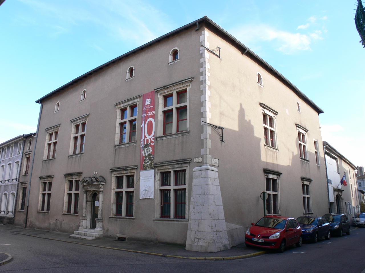 Hôtel de la Monnaie de Pont-à-Mousson, actuellement Musée au fil du Papier